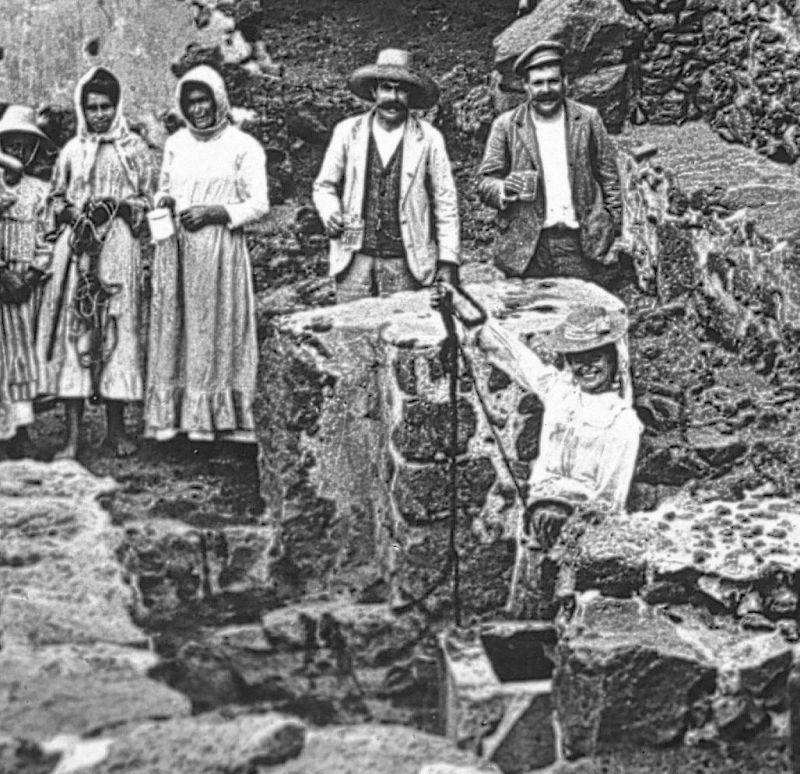 Fotografía antigua del Pozo de la Salud, Sabinosa, isla de El Hierro, Canarias, España.